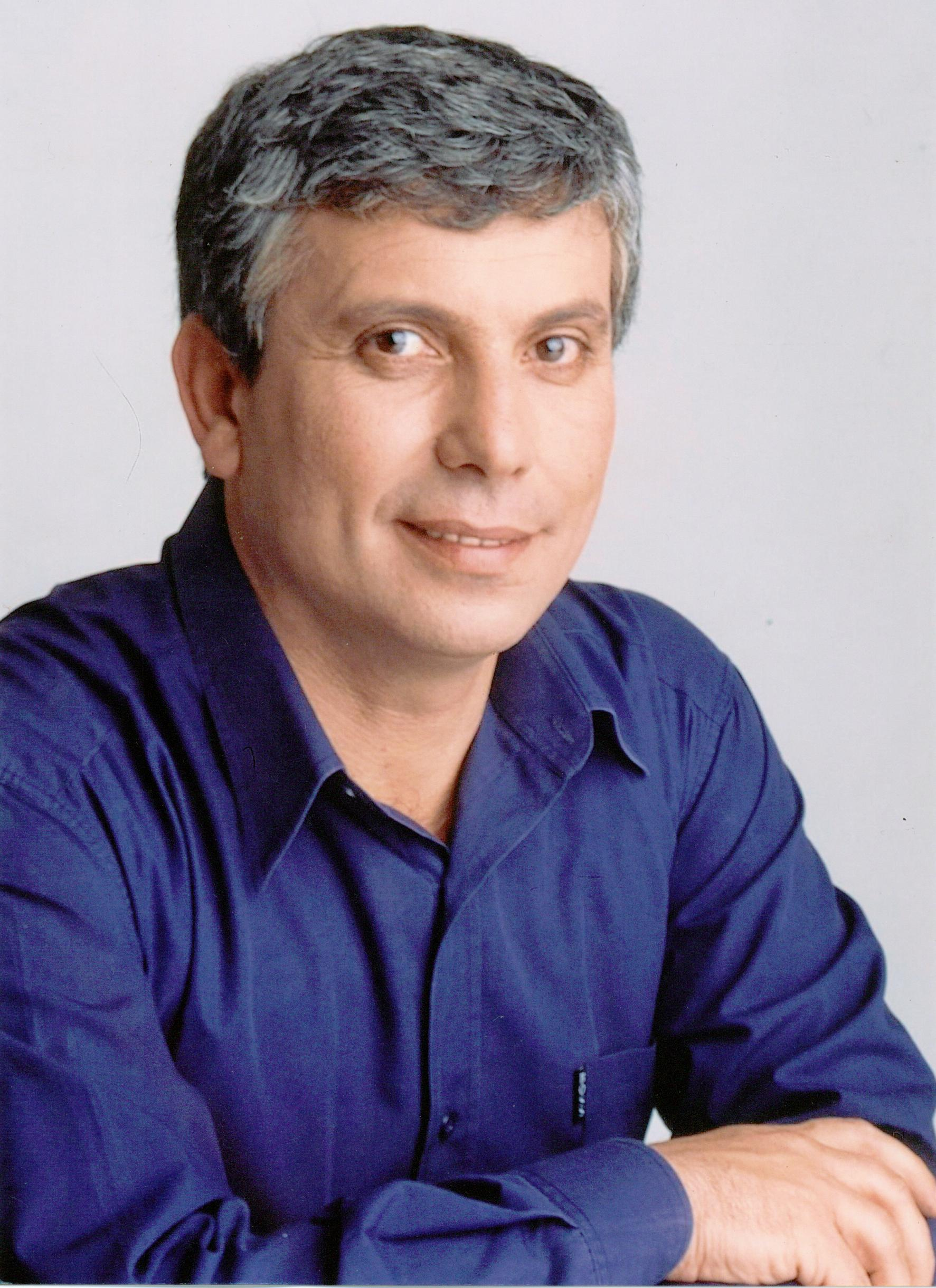 he:חבר הכנסת he:שלום שמחון